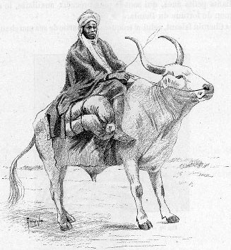 Sarrakholais sur son boeuf porteur (illustration de Côte occidentale d'Afrique du Colonel Frey, fig. 60, p. 96)